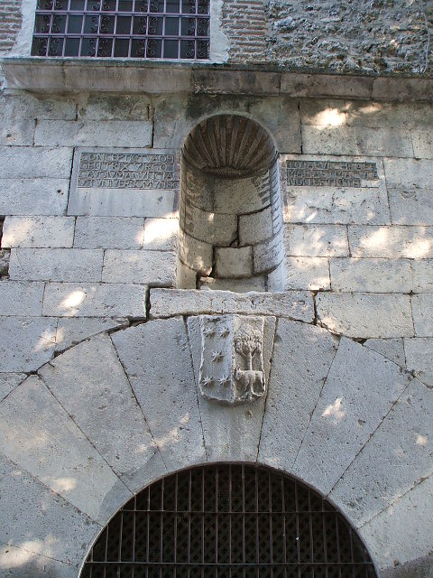 Fachada principal de la antigua iglesia conventual de la Concepción de Cuéllar